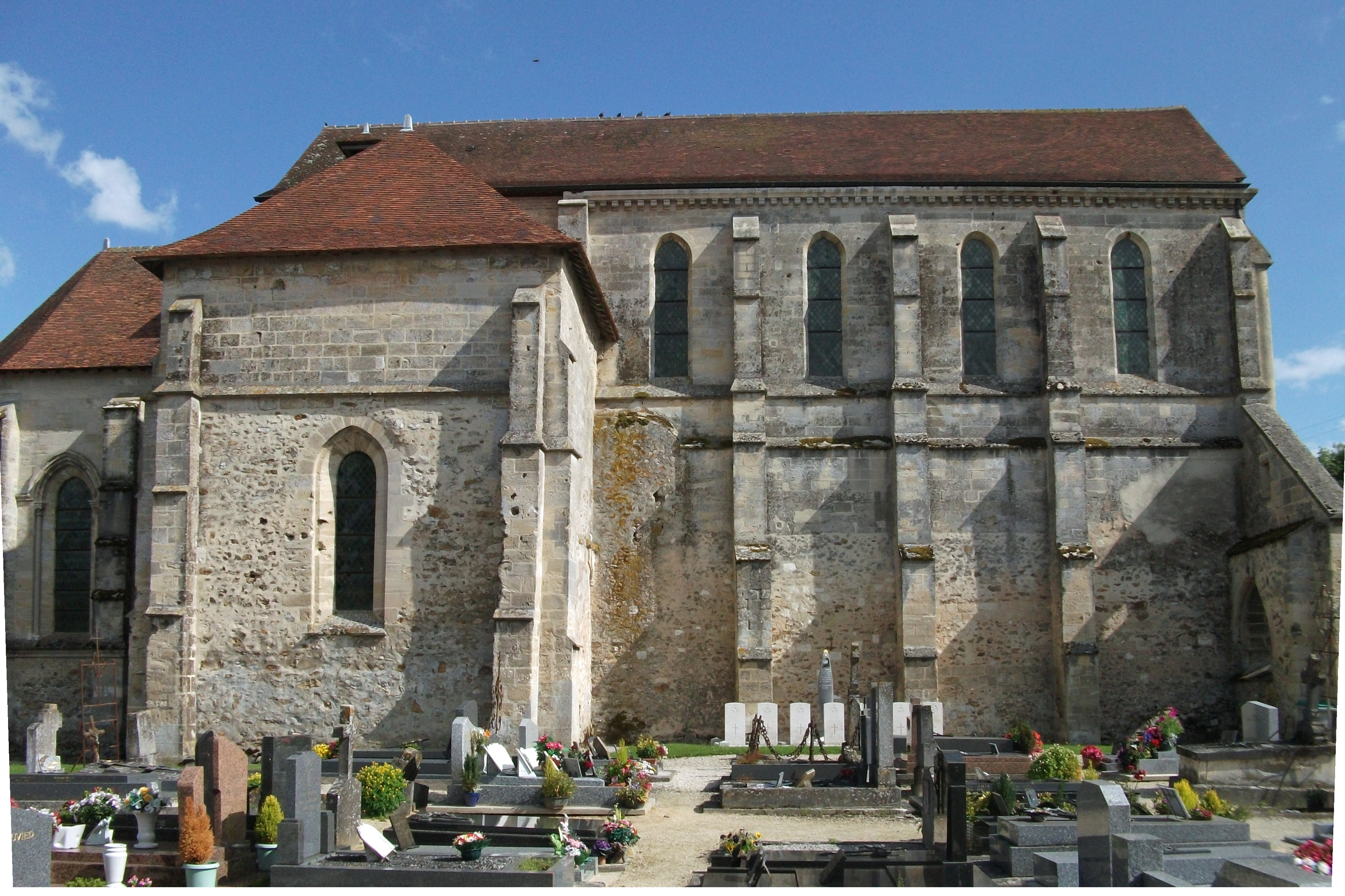 l'église st-Basle et les tombes des soldats britanniques reposant devant l'élice de leur Liberator. Le 15 avril 1943, avec Powell, Button, Dent, Scott, Sheperd, Williams et Ingram comme soldats à son bord.